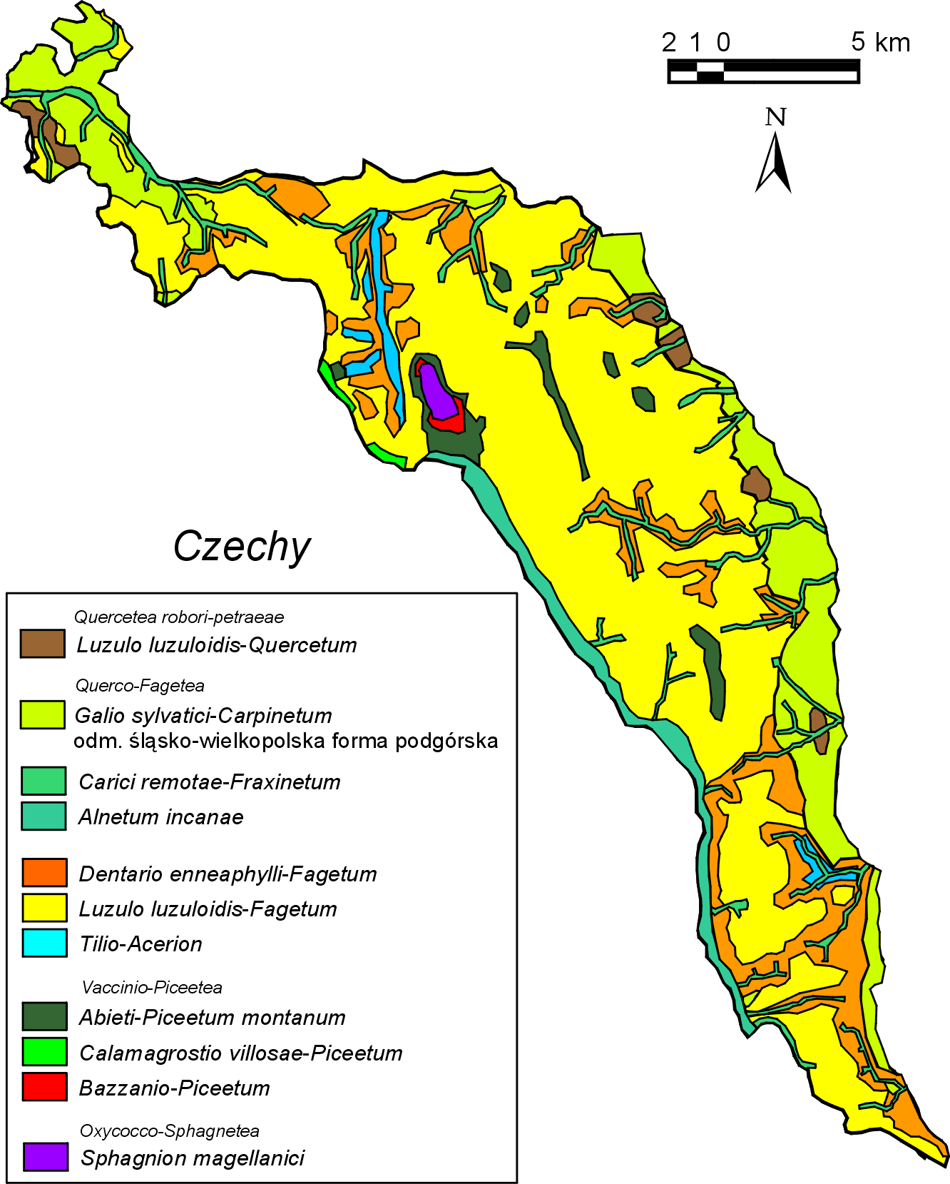 Góry Bystrzyckie, Góry Orlickie i Pogórze Orlickie - potencjalna roślinność naturalna. Skala 1:300 000. Wg J. M. Matuszkiewicza, zmienione i uzupełnione. Autor: M. Smoczyk, 2006.